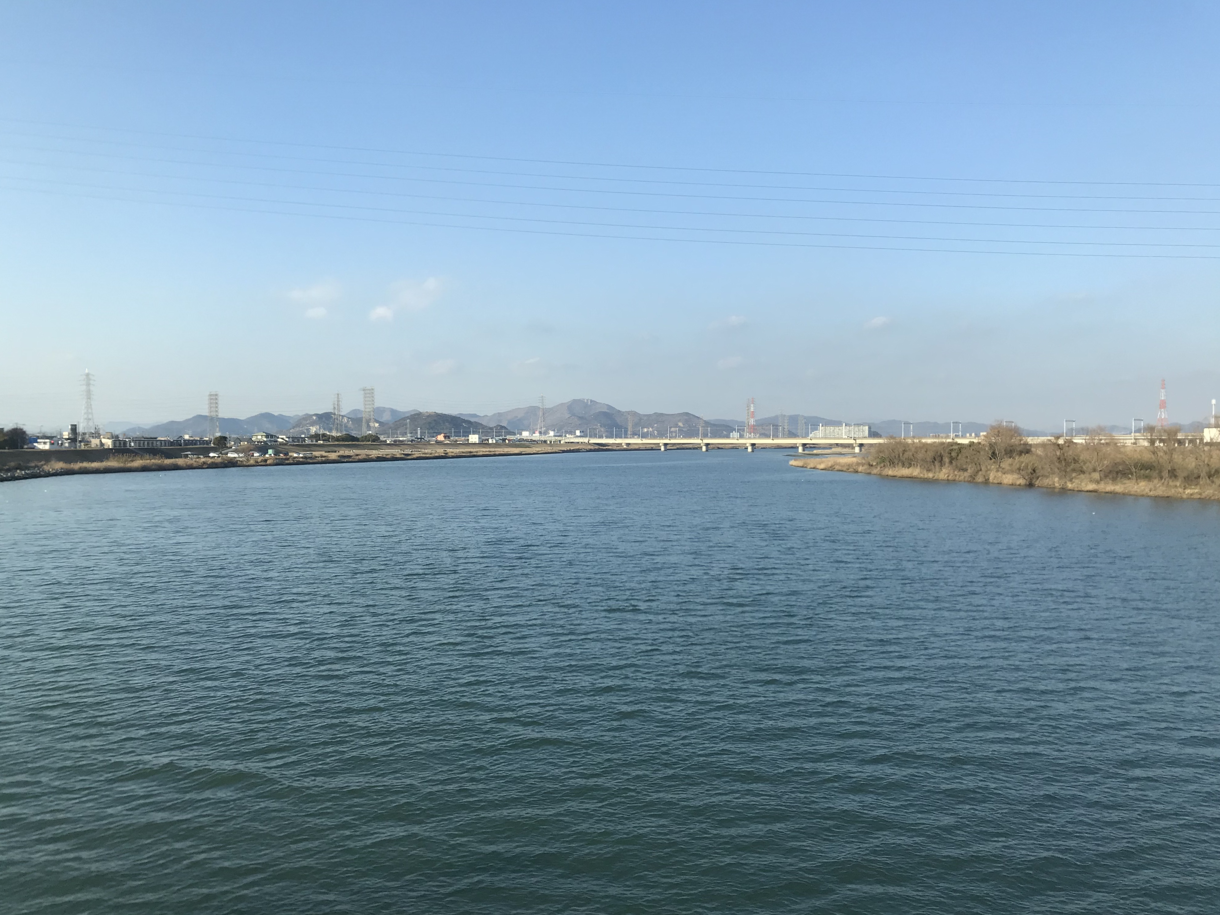 山陽電鉄本線の列車内より望む加古川と山陽新幹線の橋梁